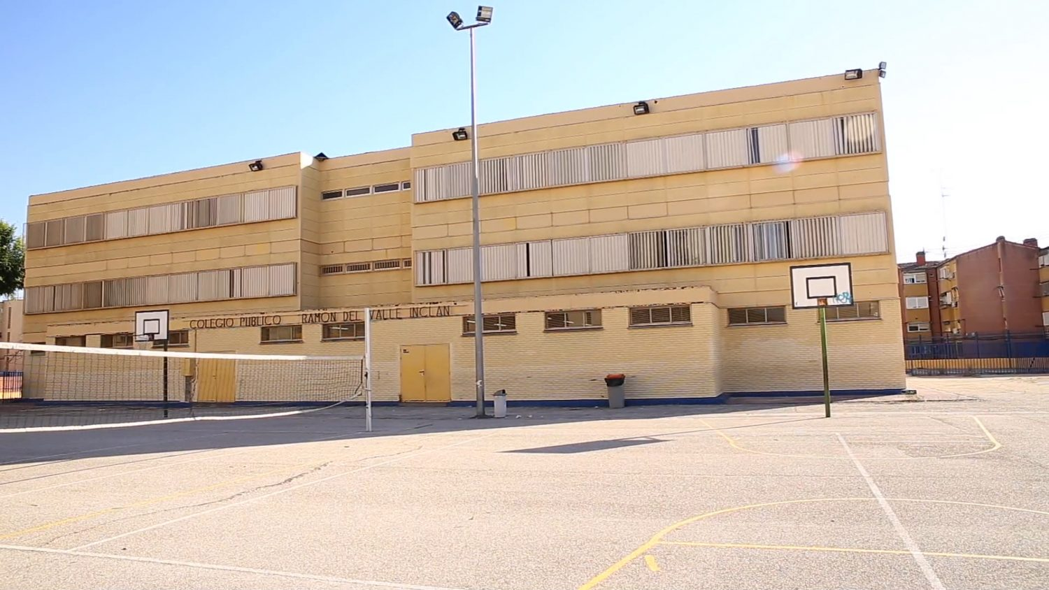 El Ayuntamiento de Madrid, a través del Área de Salud, Seguridad y Emergencias, va a poner en marcha el proyecto piloto “Cuidados en entornos escolares en la ciudad de Madrid” en tres colegios de los distritos de San Blas-Canillejas, Moncloa-Aravaca y Usera, con el objetivo de intervenir en los patios escolares, accesos al colegio y zonas de proximidad para convertirlos en espacios promotores de salud y bienestar que fomenten la convivencia y sean a la vez un regeneradores de los barrios.